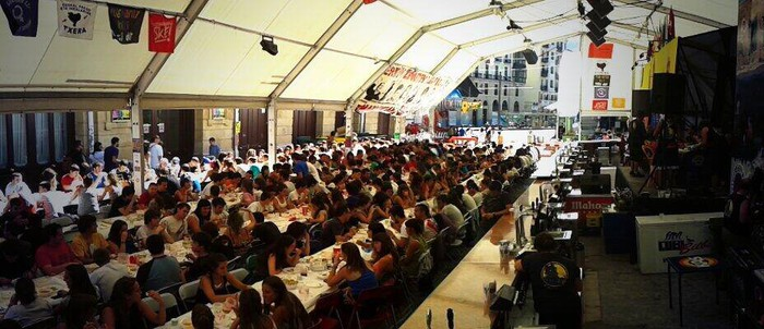 PaYa konpartsako bazkaria Bilboko aste nagusian